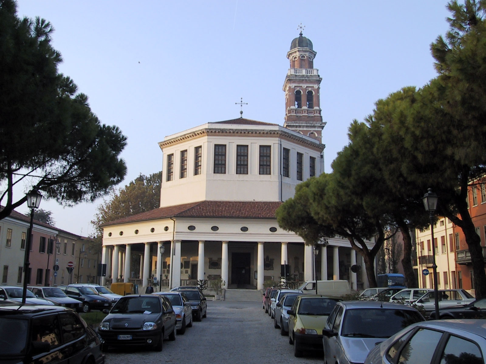 Santa Maria del Soccorso Church in Rovigo. Front view.